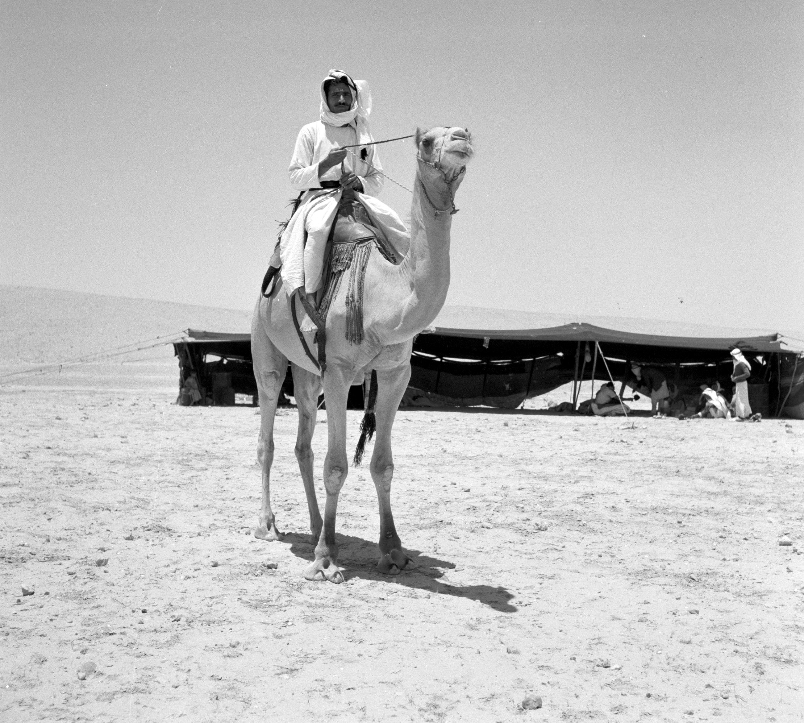 Collectie / Archief : Fotocollectie Van de Poll Reportage / Serie : Israël 1960-1965: bedoeïenen in Beersjewa (Beer Sheva) Beschrijving : Bedoeien berijdt in de woestijn een kameel. Op de achtergrond een bedoeienentent Datum : 1 januari 1960 Locatie : Bersjeba, Israël Trefwoorden : bedoeïenen, kamelen, tenten, woestijnen Fotograaf : Poll, Willem van de, [onbekend] Auteursrechthebbende : Nationaal Archief Materiaalsoort : Negatief (zwart/wit) Nummer archiefinventaris : bekijk toegang 2.24.14.02 Bestanddeelnummer : 255-3470